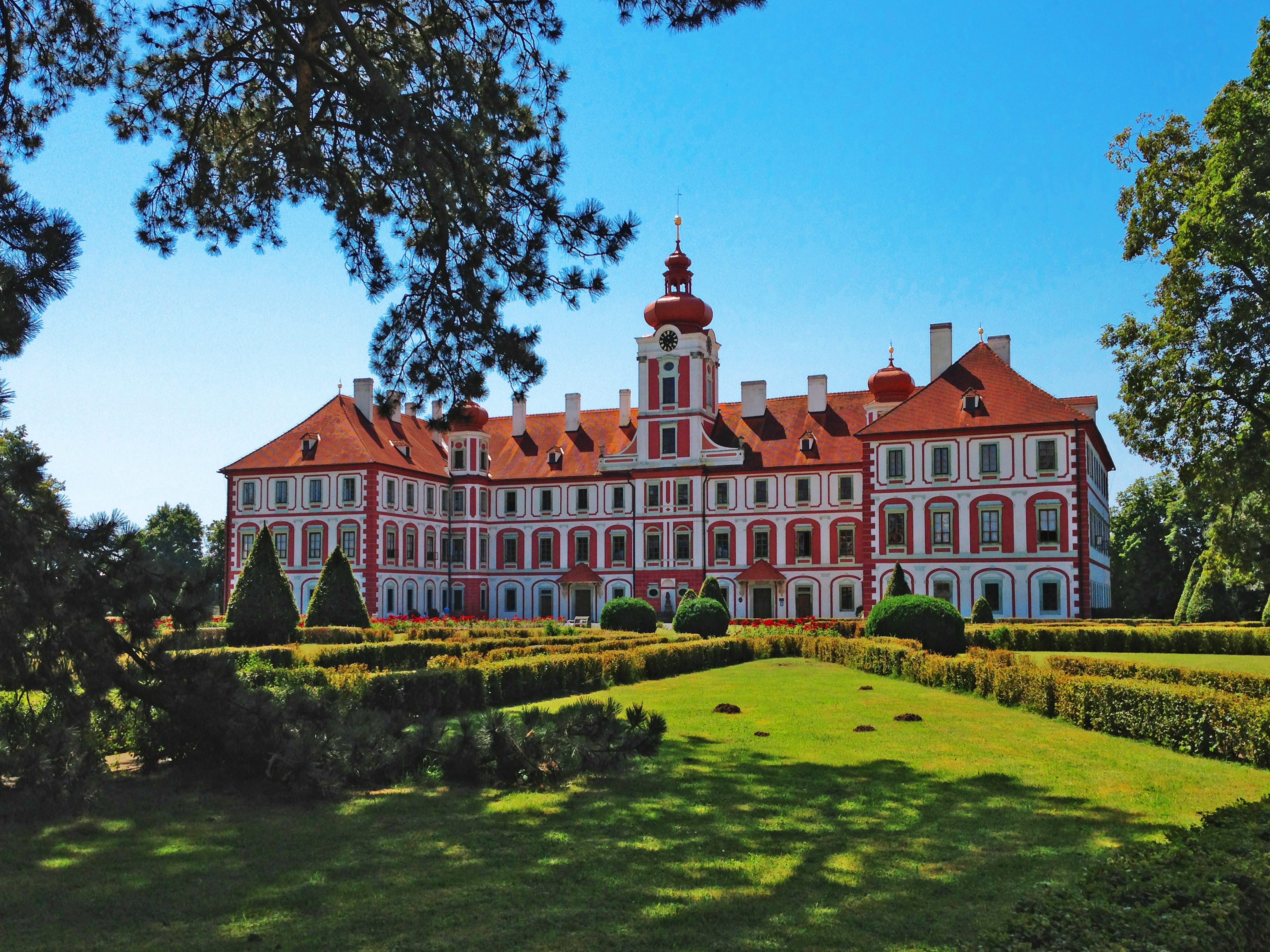 Zámek Mnichovo Hradiště, V Lípách 148, Mnichovo Hradiště